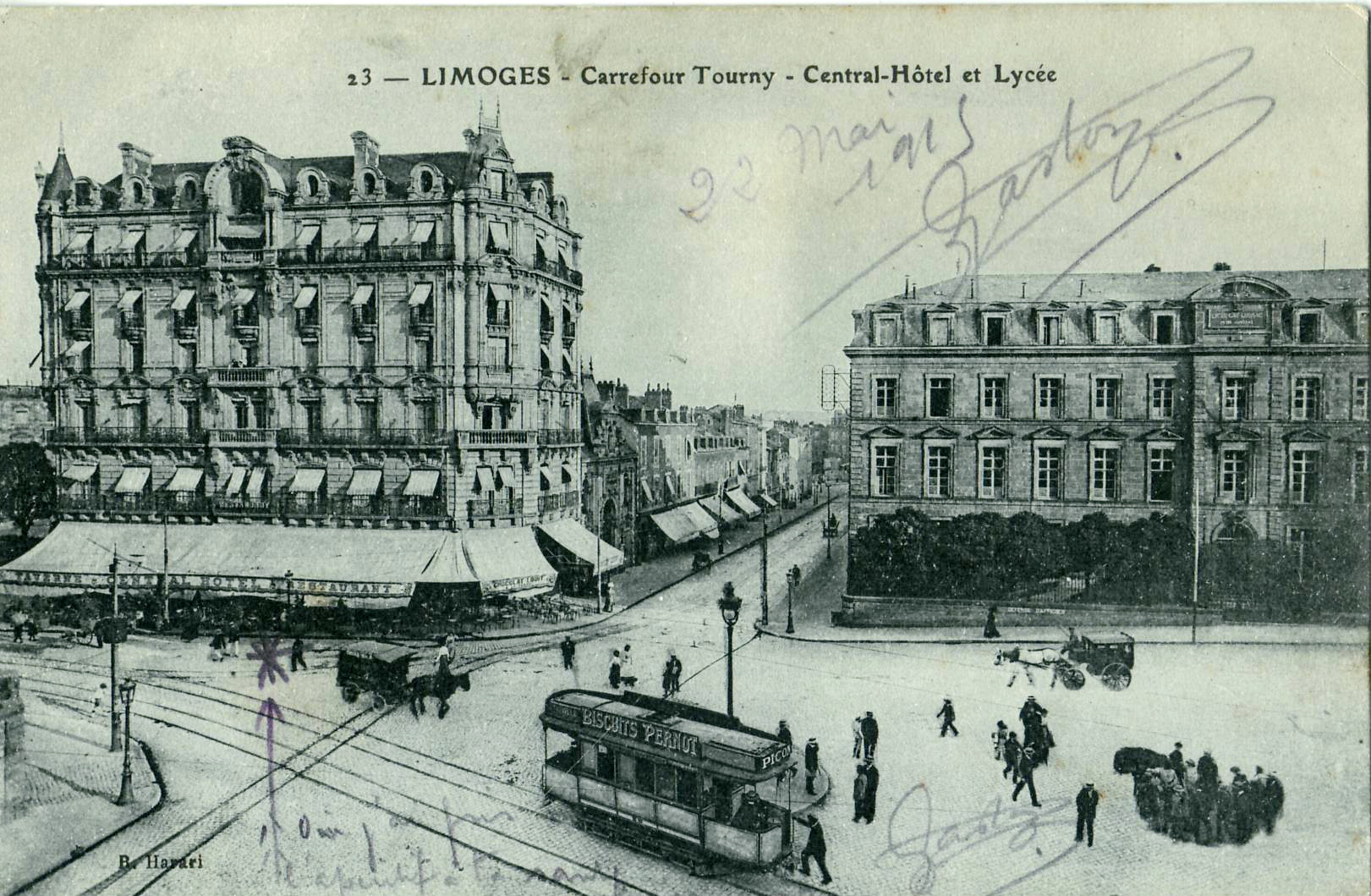 Carte postale ancienne éditée par Harari, n°23 : Limoges - Carrefour Tourny - Central-Hôtel et Lycée